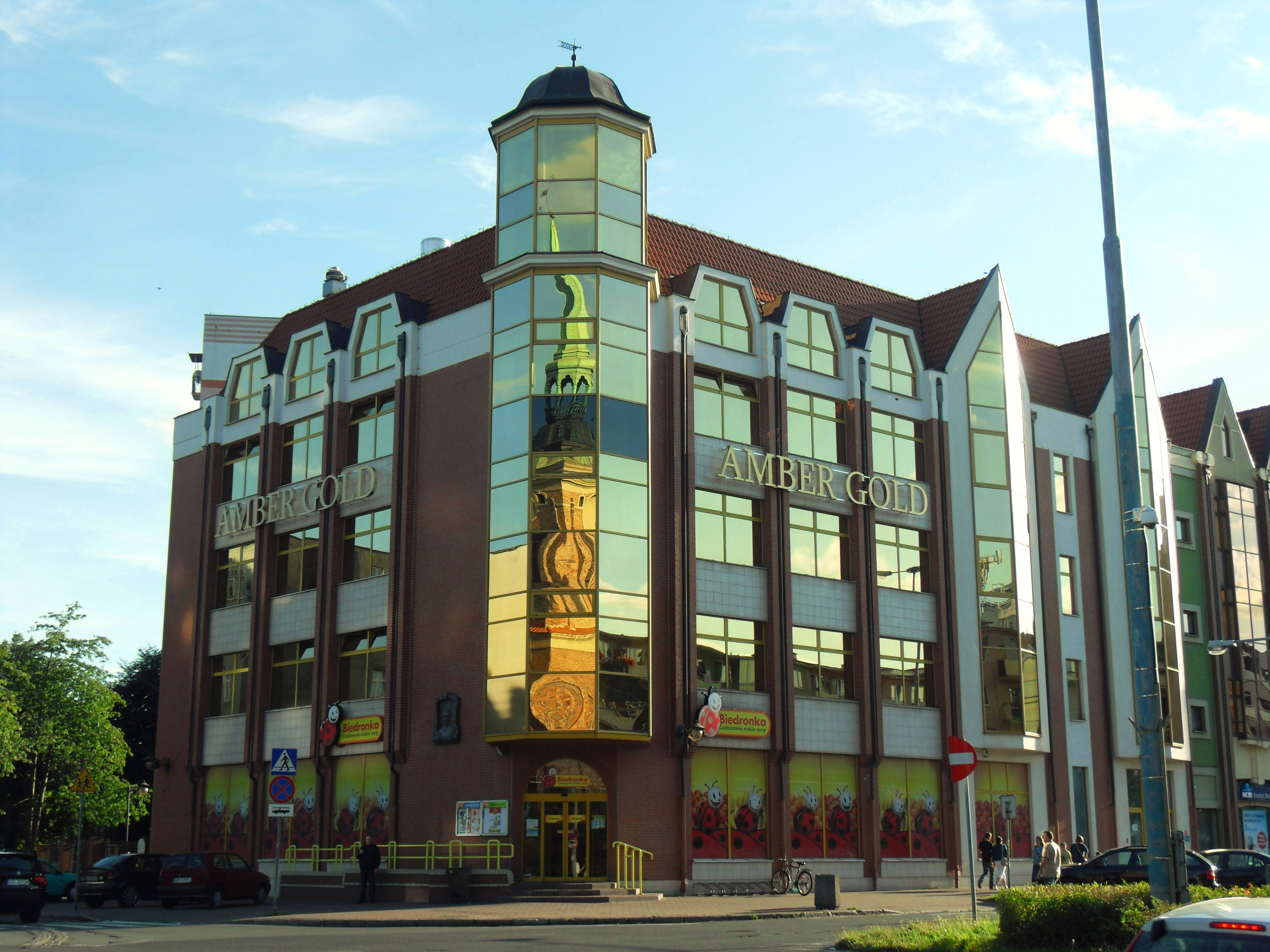 Gdańsk Długie Ogrody. Ul. Długie Ogrody 14: "Amber Gold" i "Biedronka".